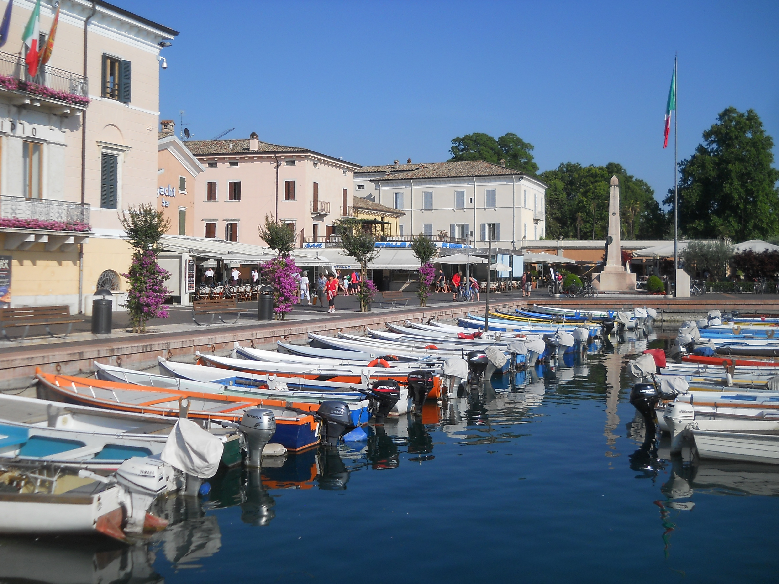 Vecchio porticciolo di Bardolino